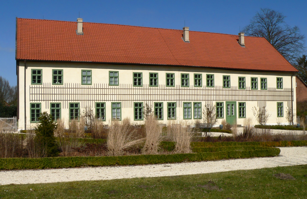 Ehemaliges Fabrikantenwohnhaus der Glashütte Gernheim